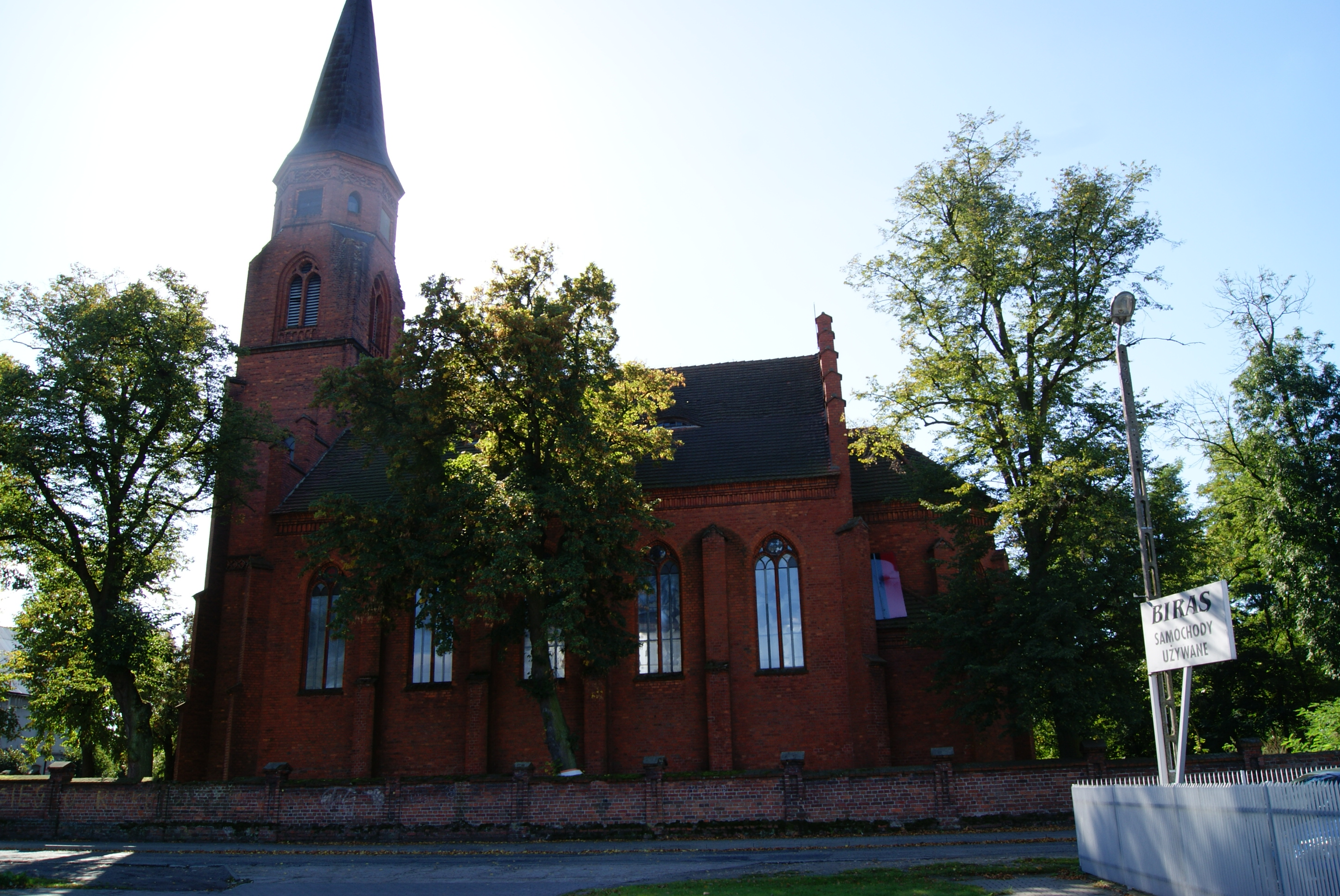 Grabów nad Prosną, ul. Kaliska 31 - dawny kościół ewangelicki z 1887 r., widok od strony salonu samochodowego (zabytek nr 710/Wlkp/A)